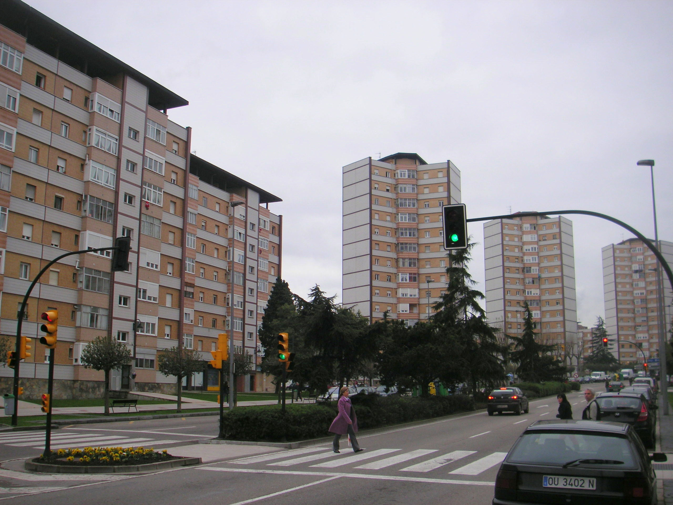 Bloques pertenecientes a las 1500 viviendas situados en la avenida Gaspar García Laviana, en Gijón (España).